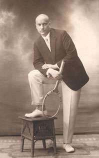 Herbert Normann